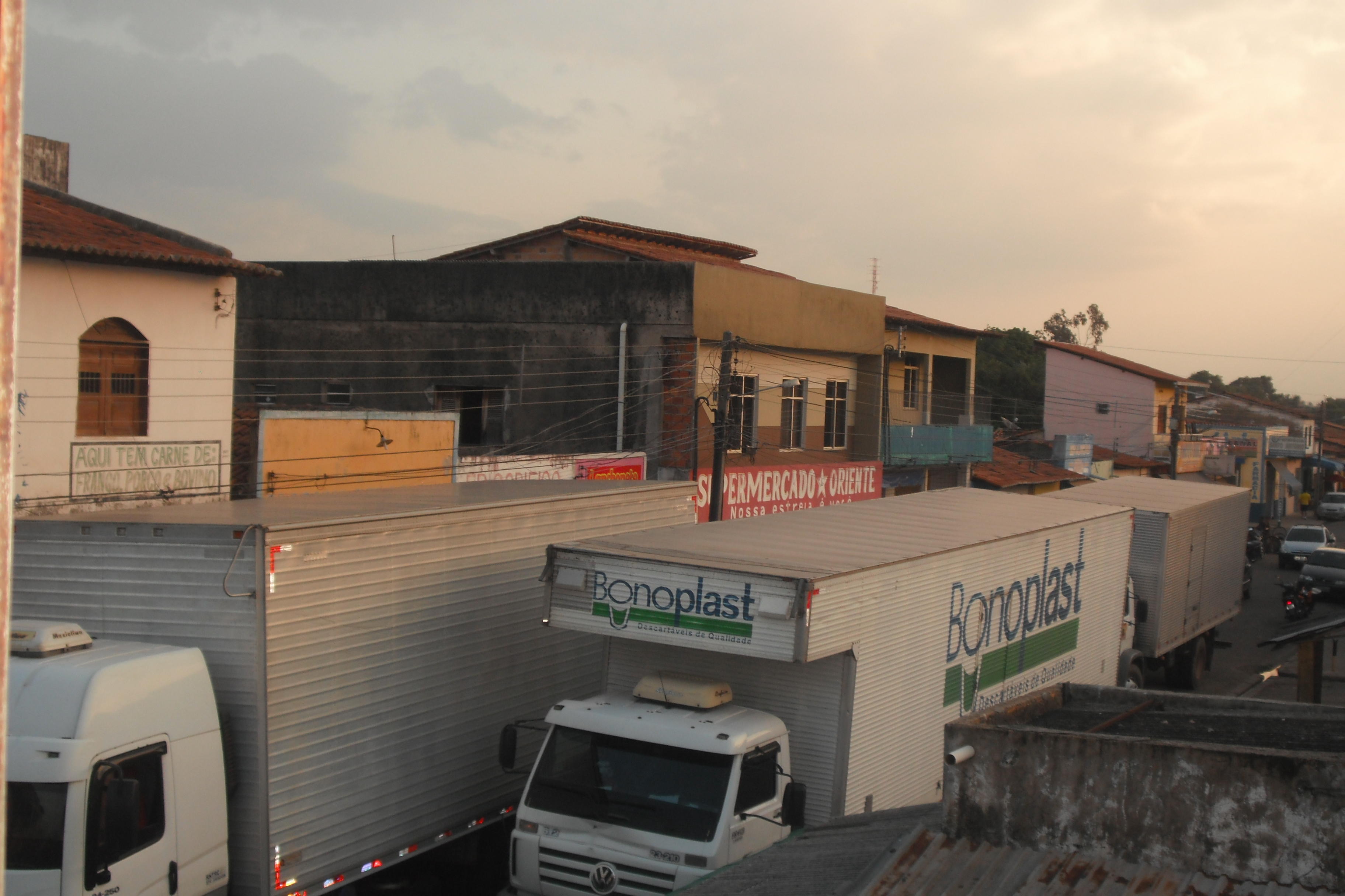 congestionamentos em sta ines